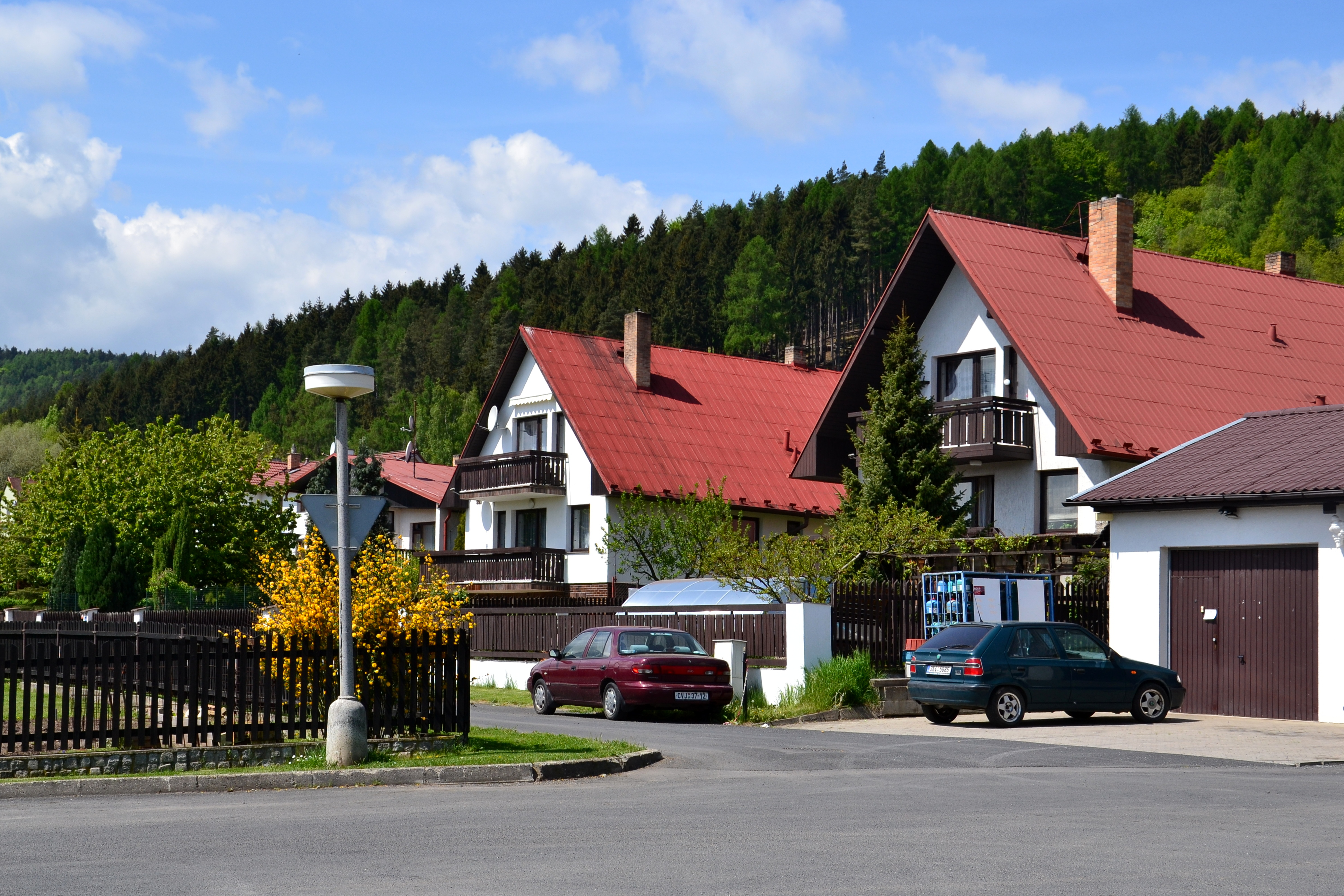 Útočiště